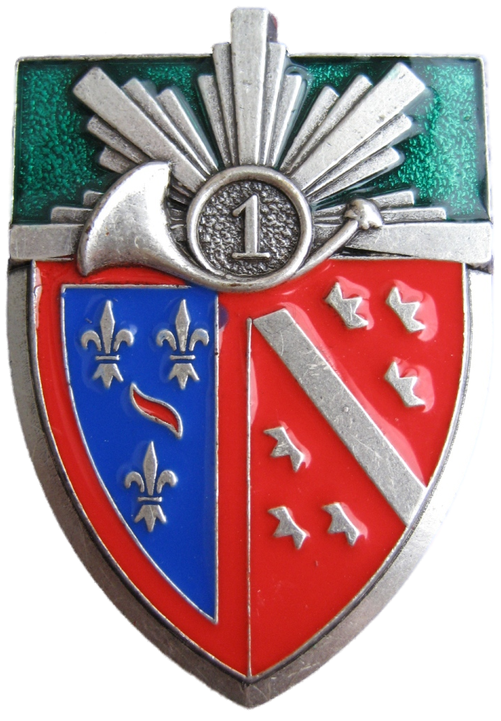 Insigne_du_1er__regt_de_Chasseurs.JPG